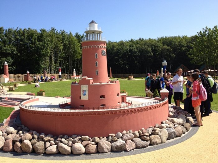 Latarnia Kołobrzeg